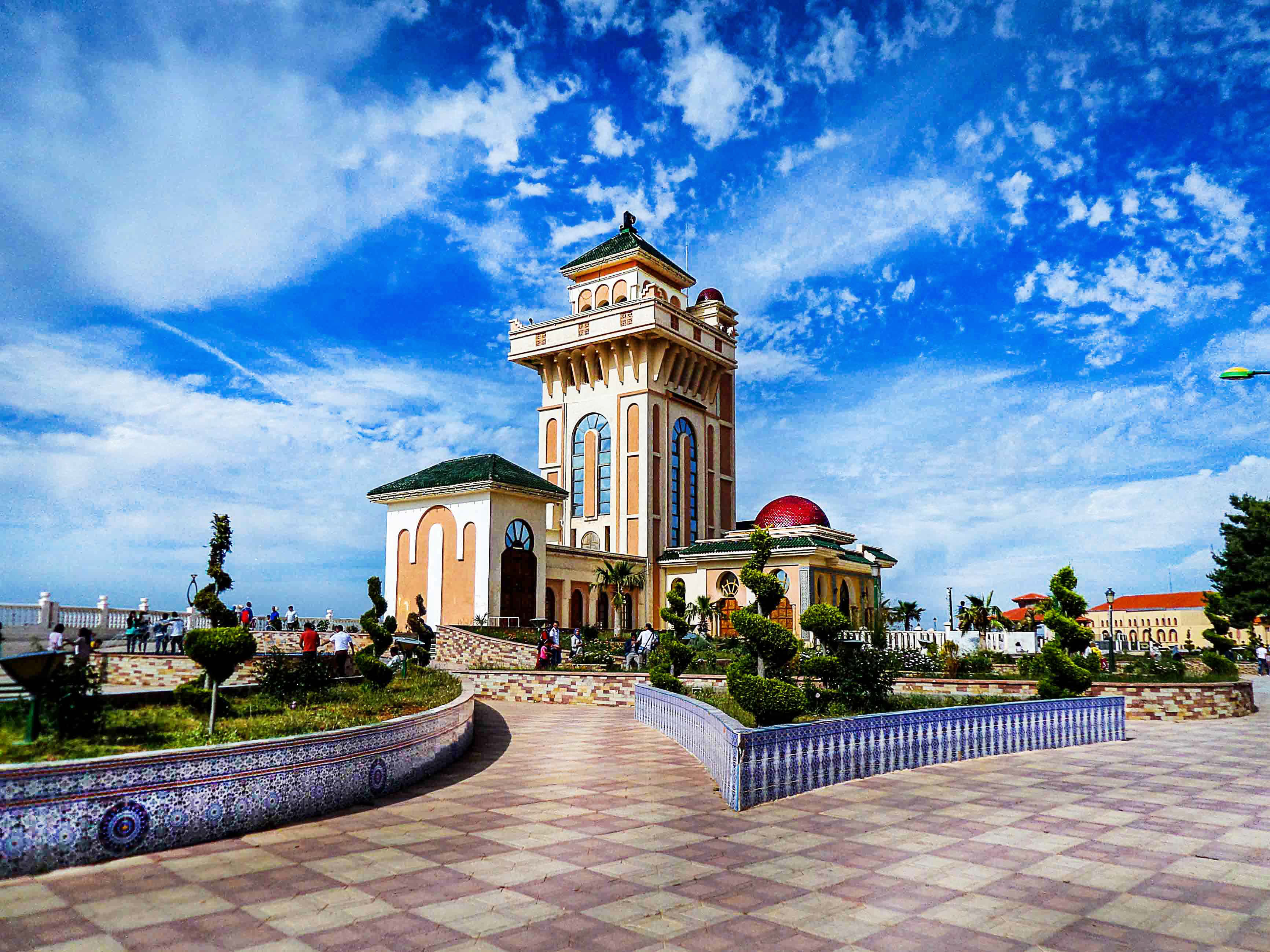 Lala Setti لالة ستي